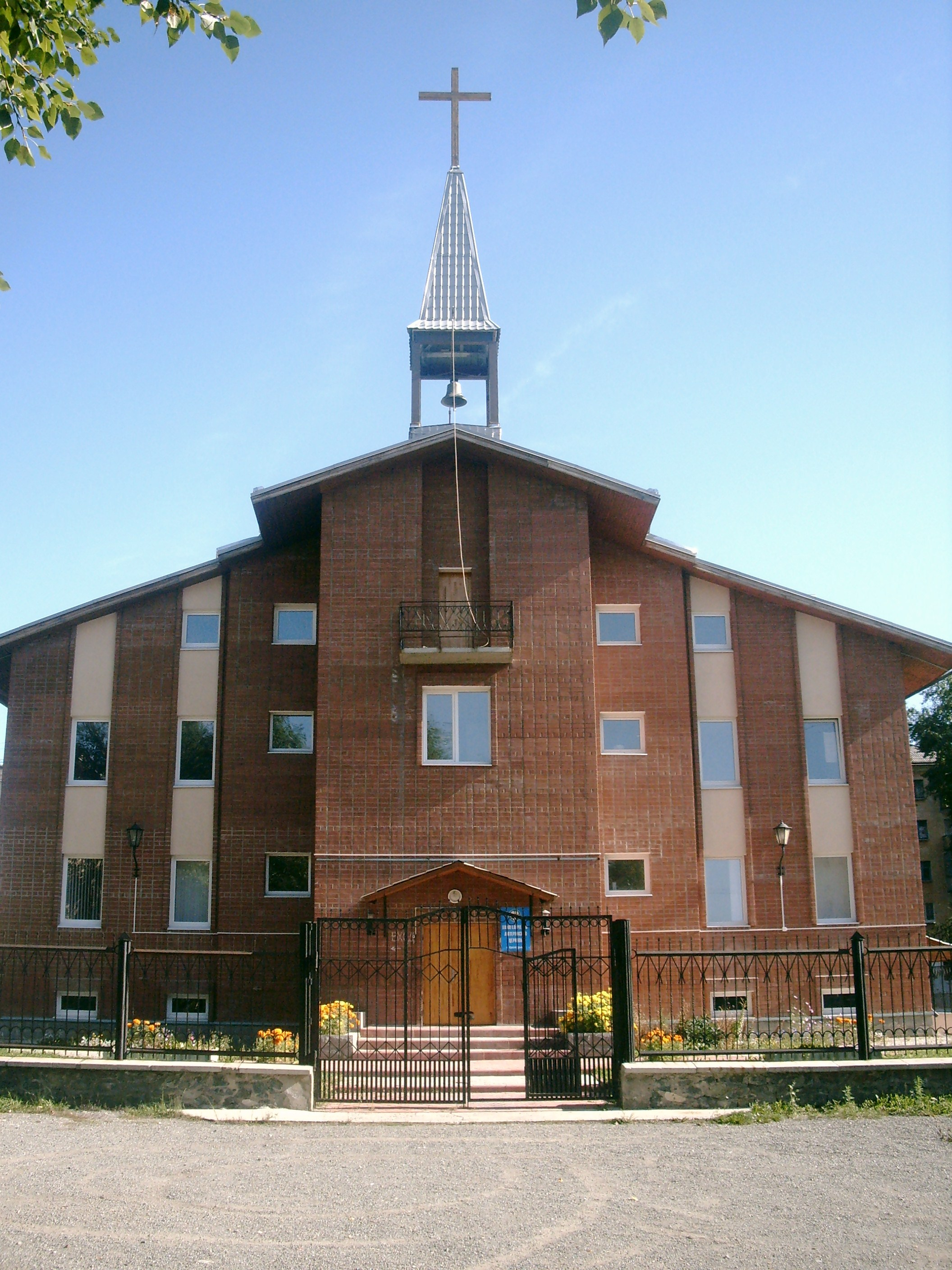 Евангелическо-лютеранская церковь в городе Краснотурьинске